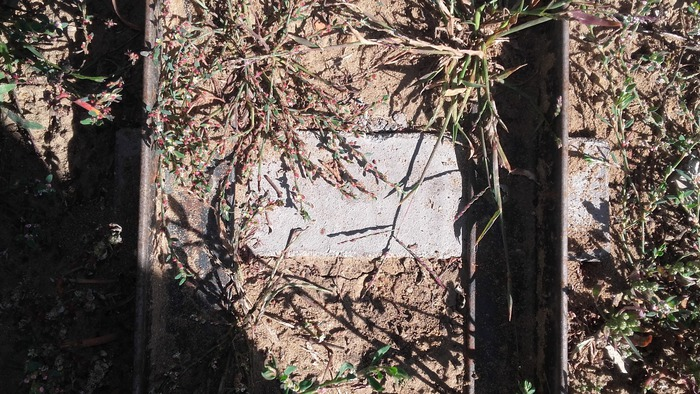 A Gödöllői Kerti Vasút pályáján 2019 júniusában kicseréltük az egyik fa keresztaljat kisérleti próbajelleggel betonaljra amiből már 4 darabot is legyártottunk, terveink szerint 2022-re már nagyrészt betonaljakat fogunk felhasználni